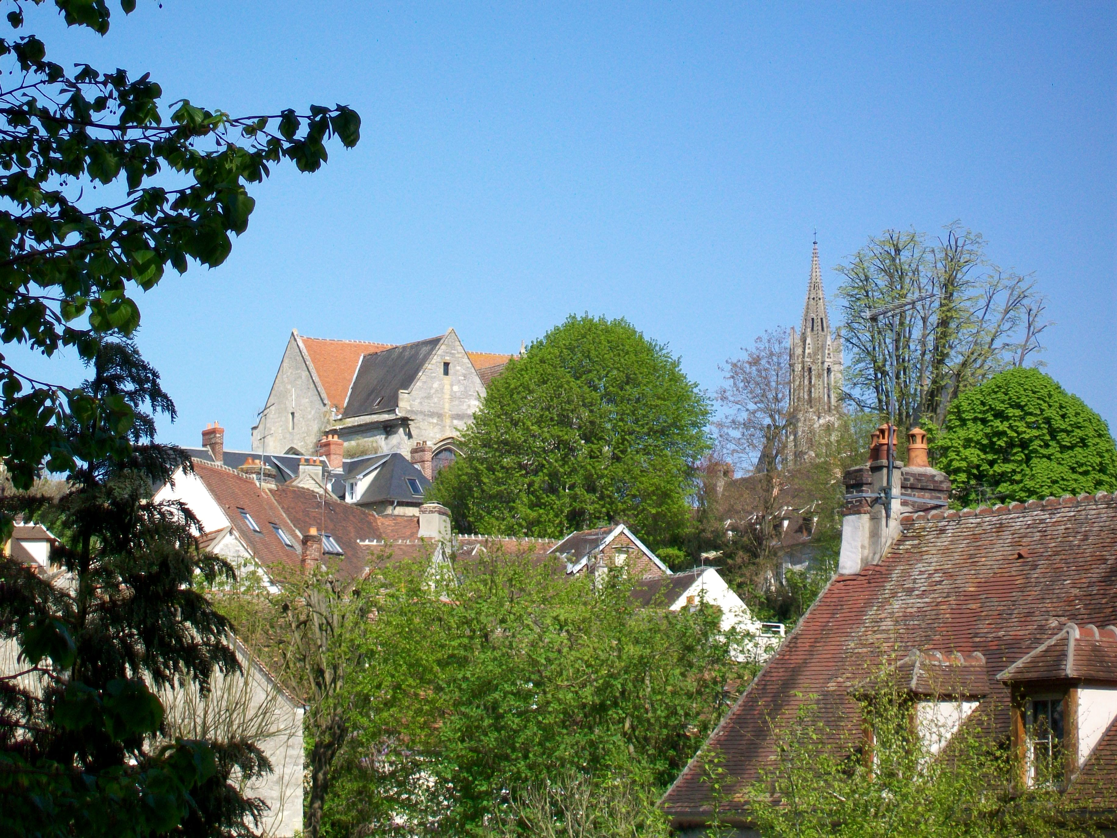 La montagne Saint-Aignan, avec au fond la flèche de la cathédrale, vue depuis le boulevard des Ôtages.